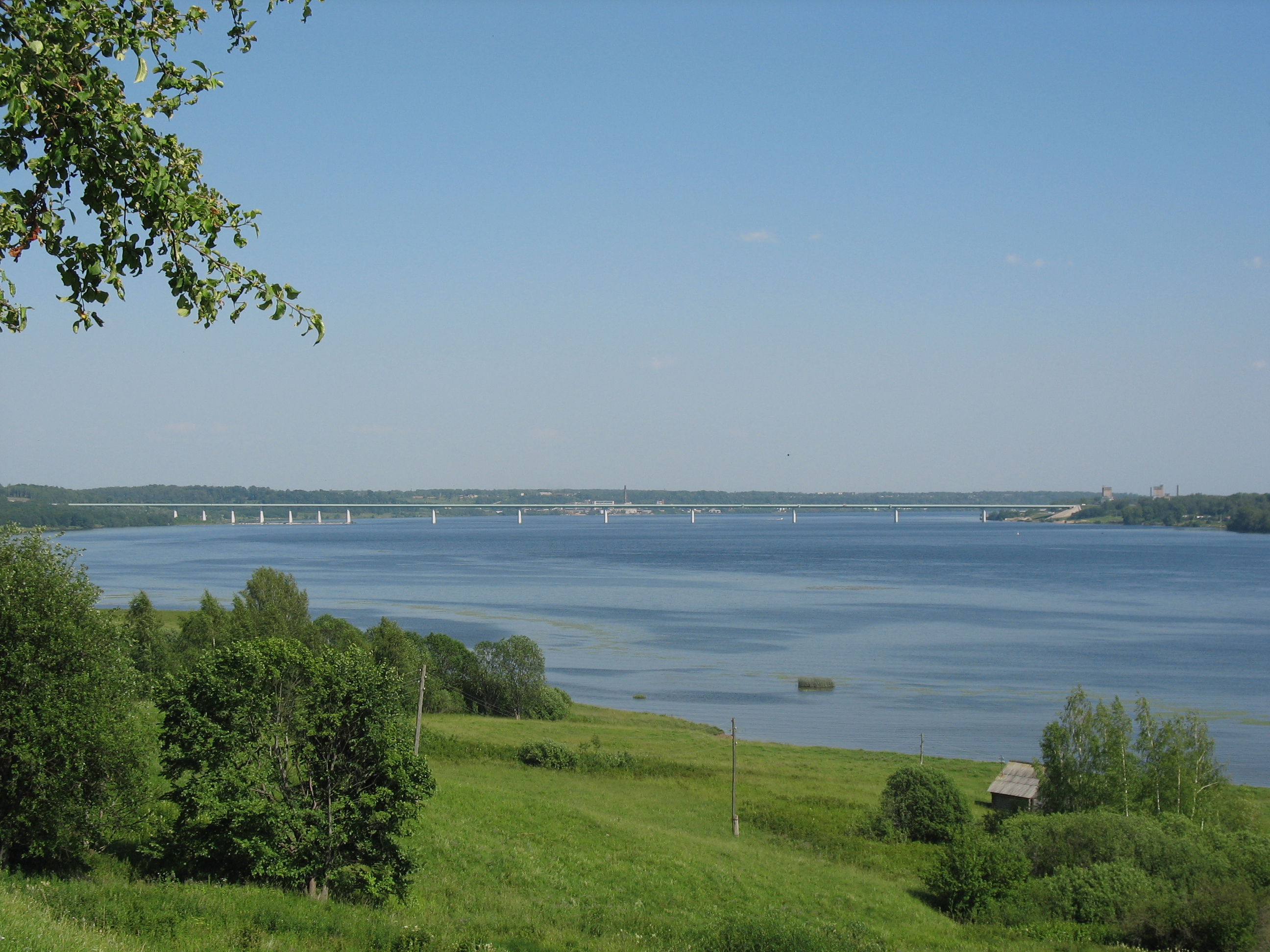 Вид на Кинешемский мост из села Воздвиженье